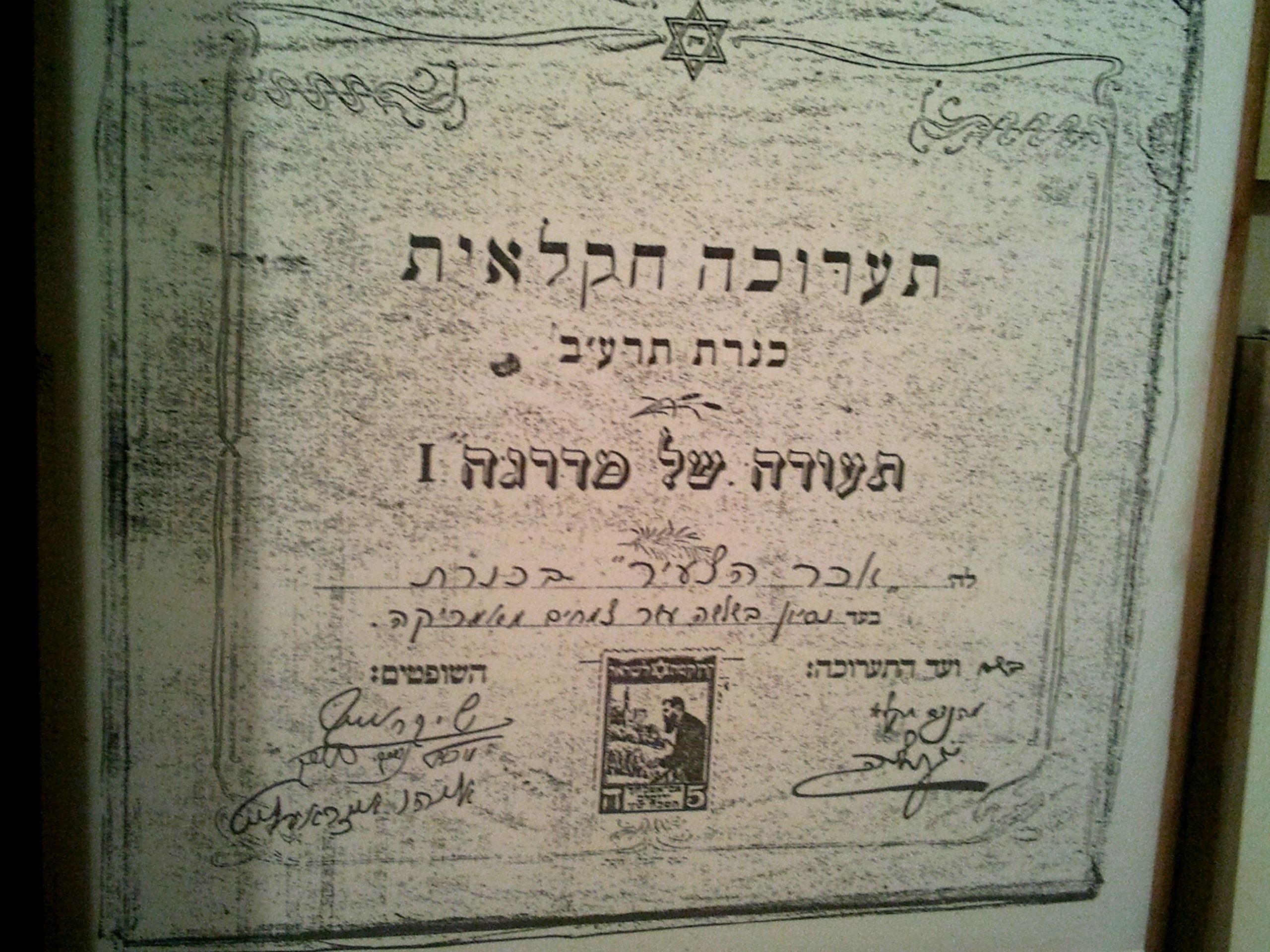 .מוזיאון לתולדות כנרת. הבית נבנה בשנת 1929 ונקרא הבית האמצעי בראש הגבעה לאחר שיפוץ נפתח בשנת 1989 מחדש ומשמש כמוזיאון קבוצת כנרת והארכיון שלה תעודה של תערוכה חקלאית של קבוצת האיכר הצעיר. חדר 2 במוזיאון